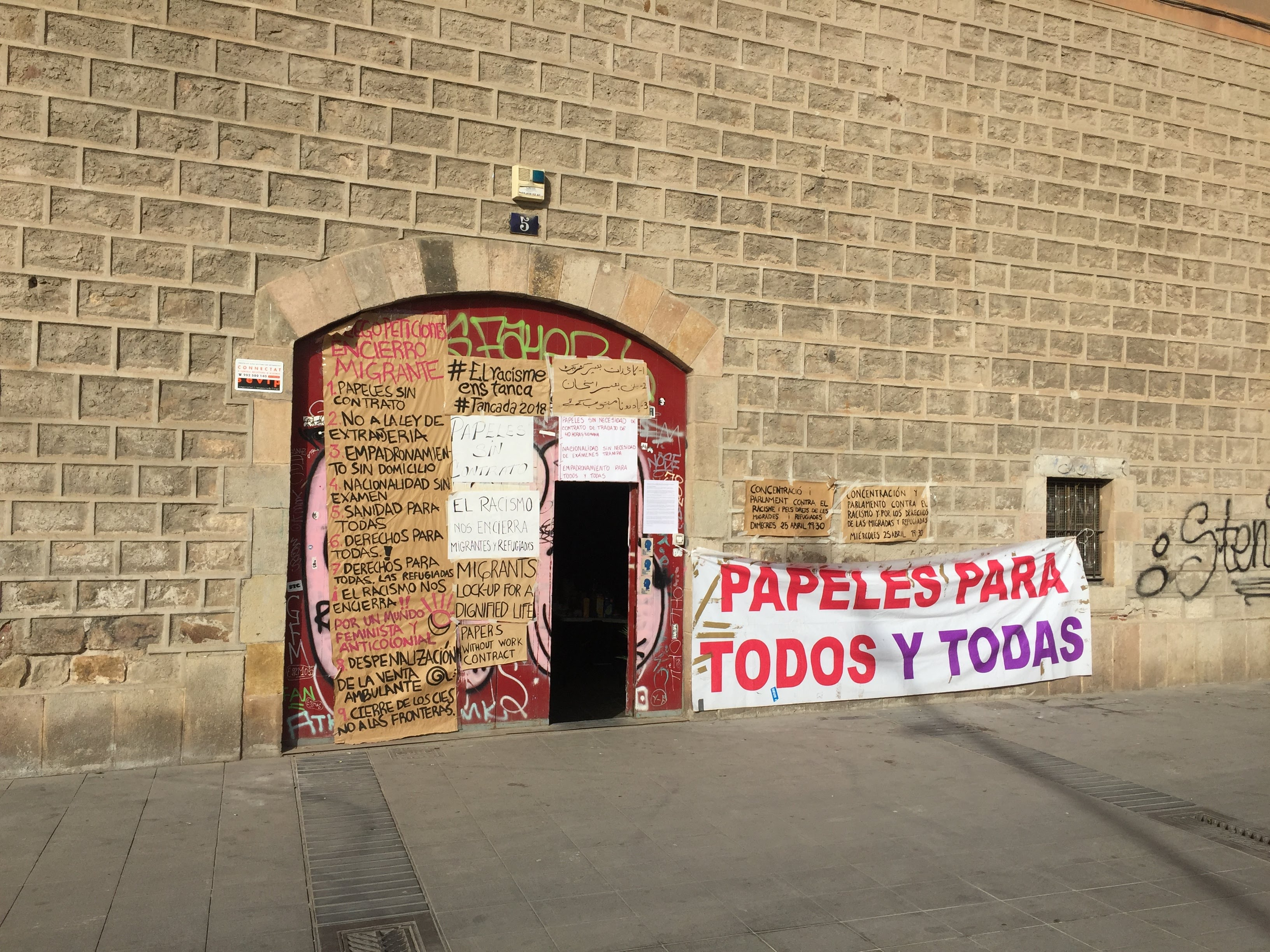 Tancada immigrants i refugiats Barcelona abril 2018